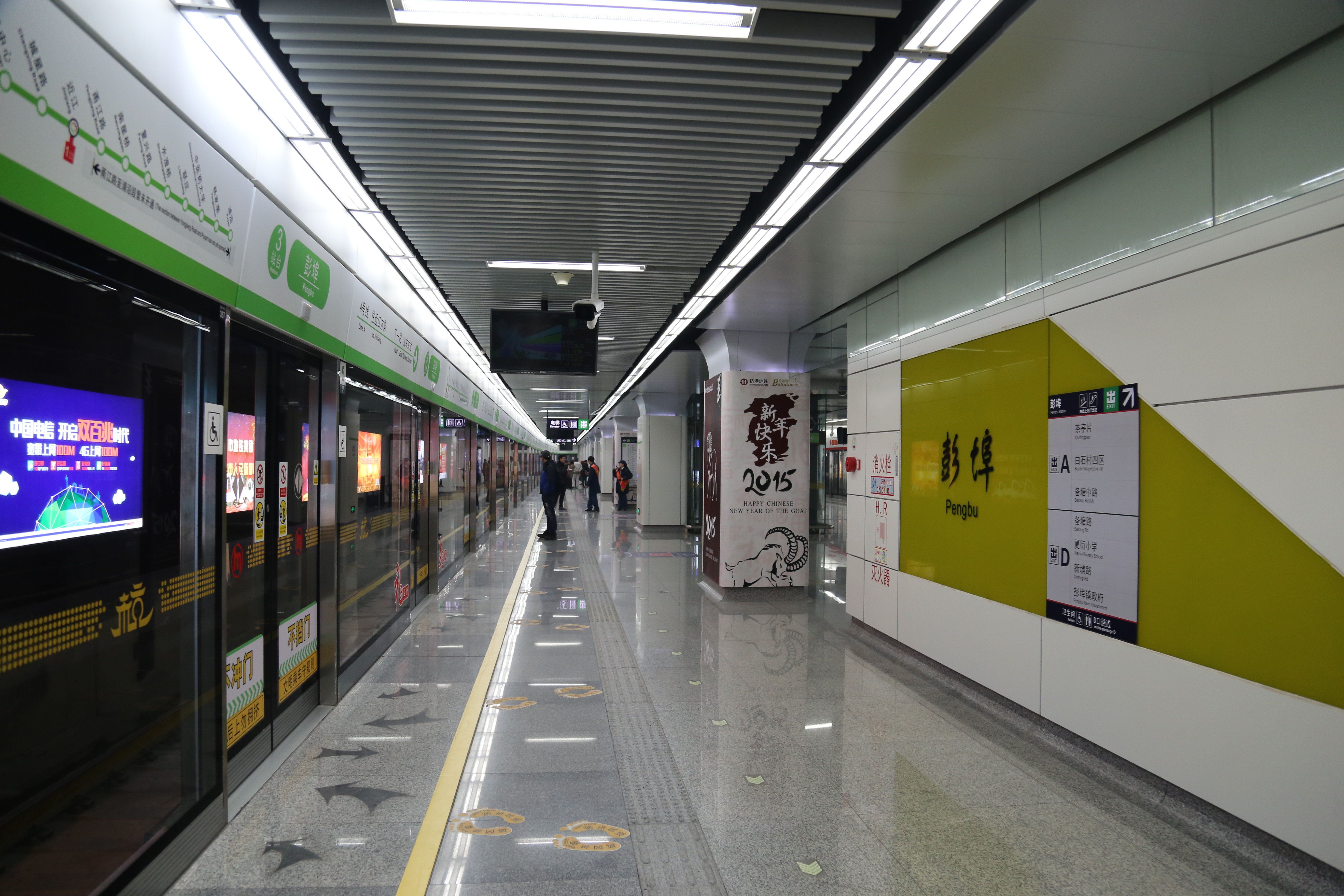 4号线彭埠站站台